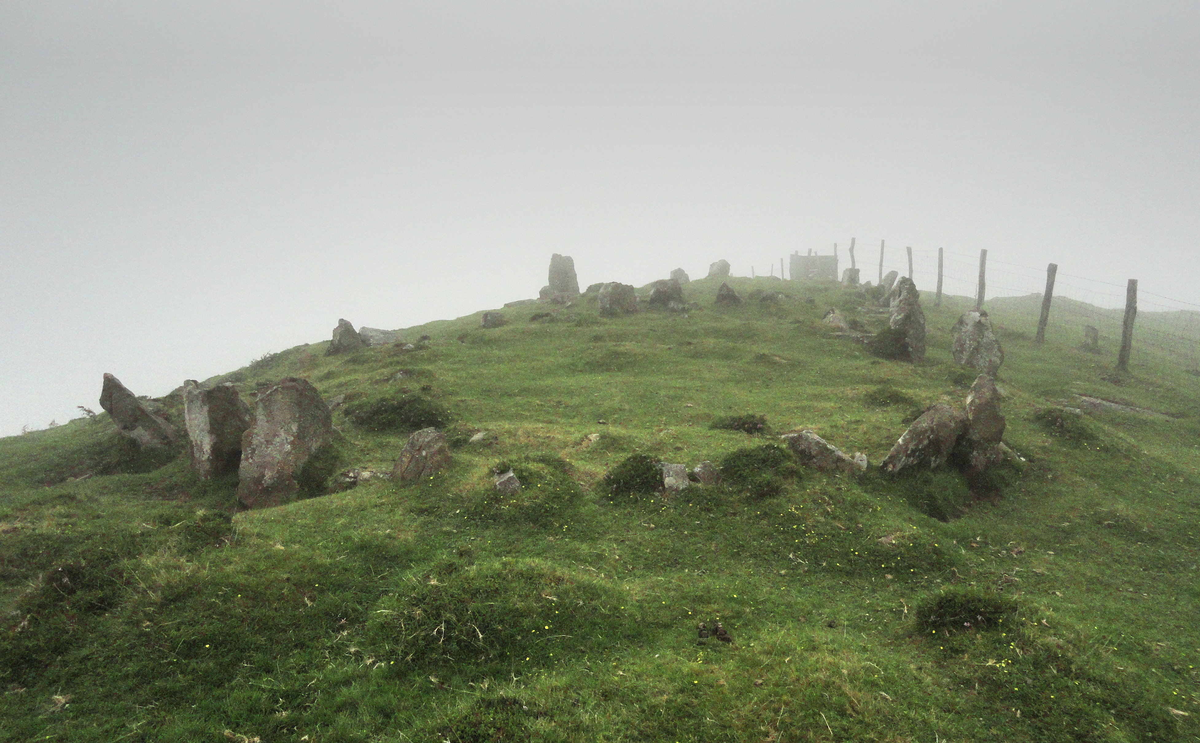 Errenga harrespilak